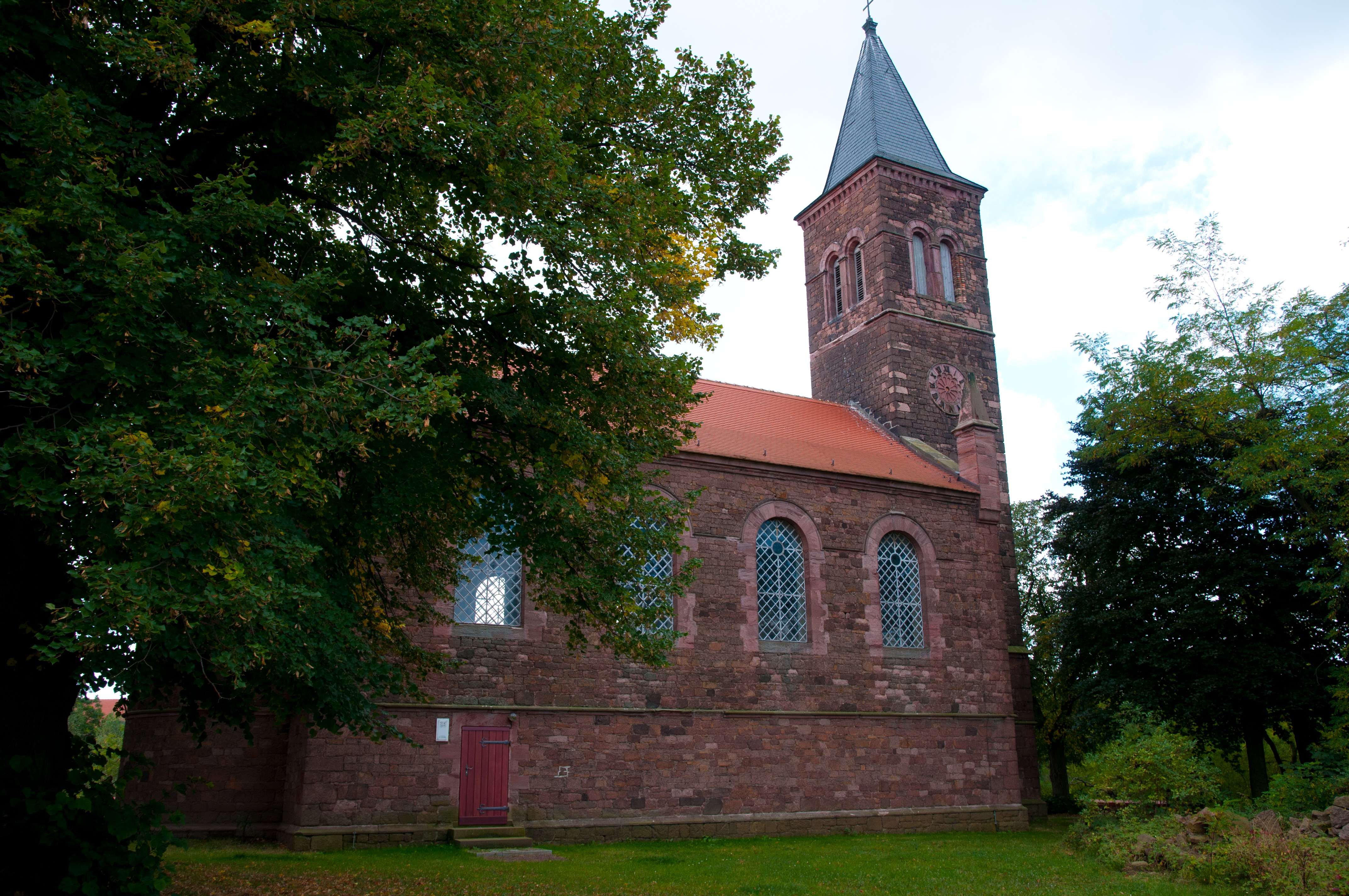 Gimritz Kirche (Sachsen Anhalt, Deutschland)